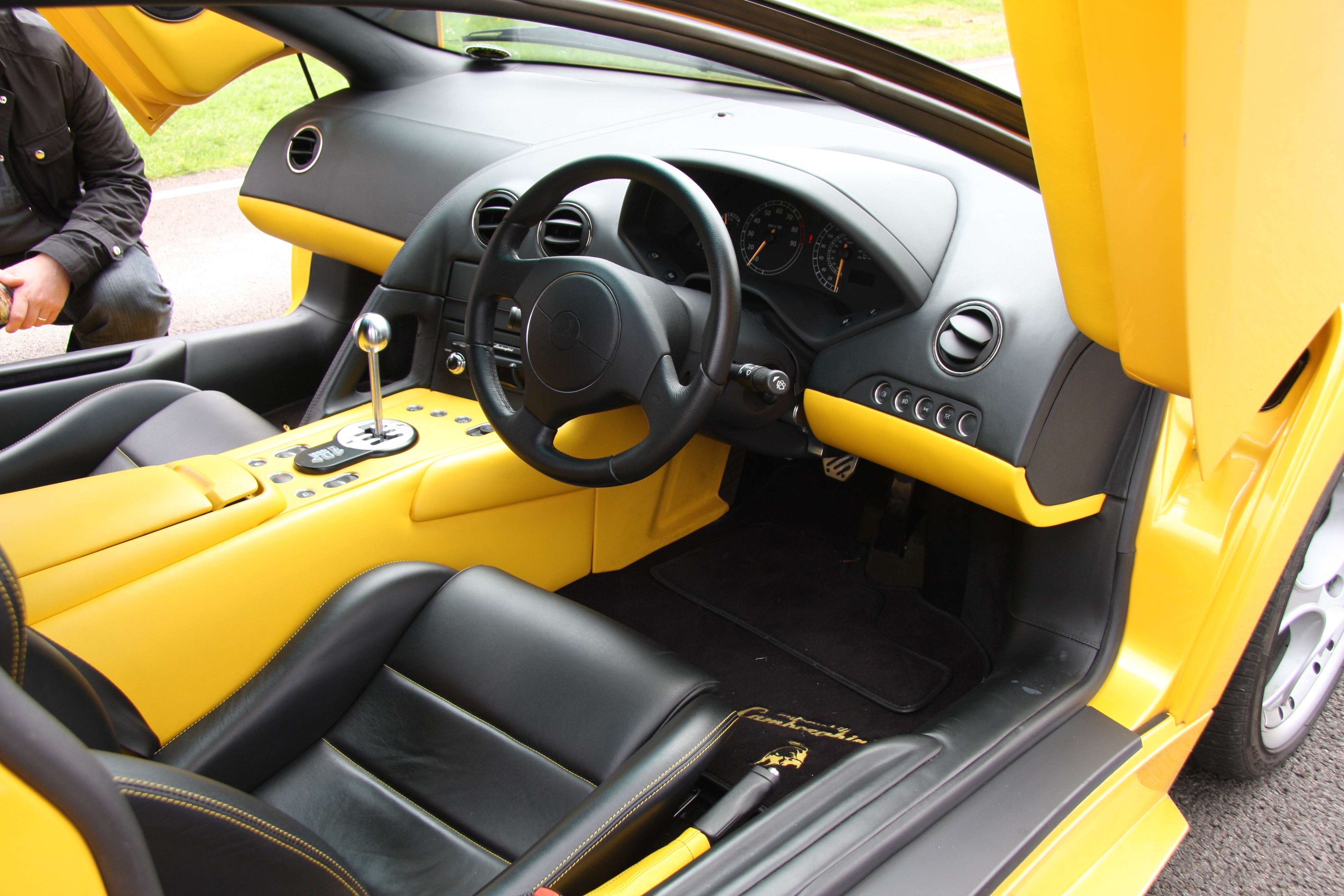 Lamborghini Murciélago